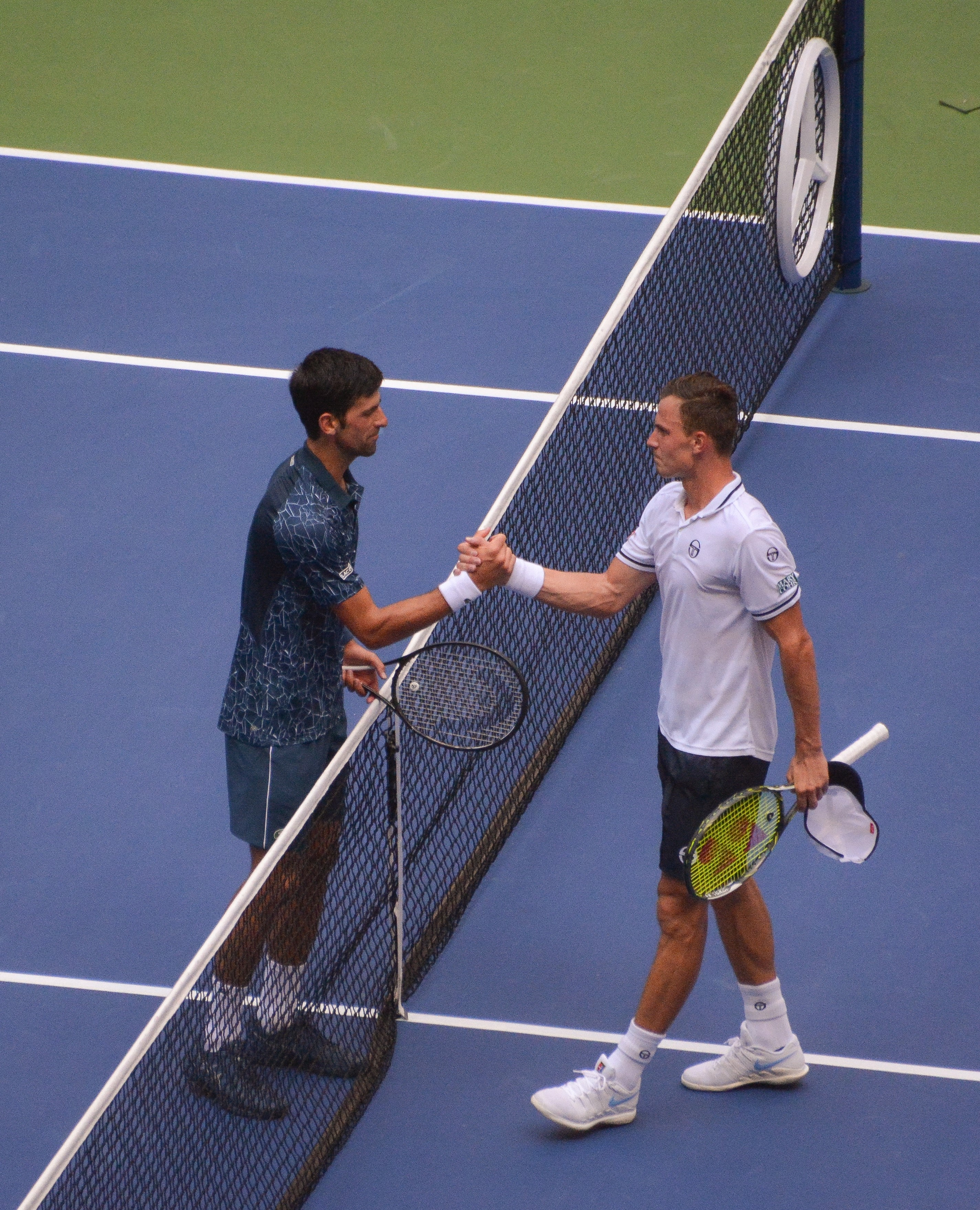 Novak Djokovic & Marton Fucsovics